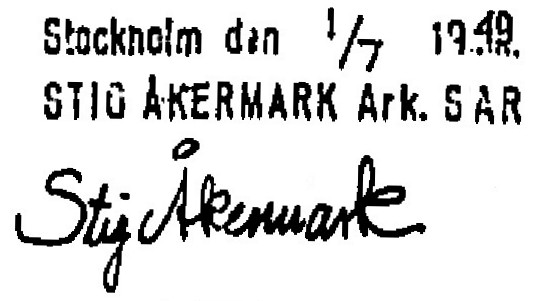 Arkitekt Stig Åkermarks namnteckning